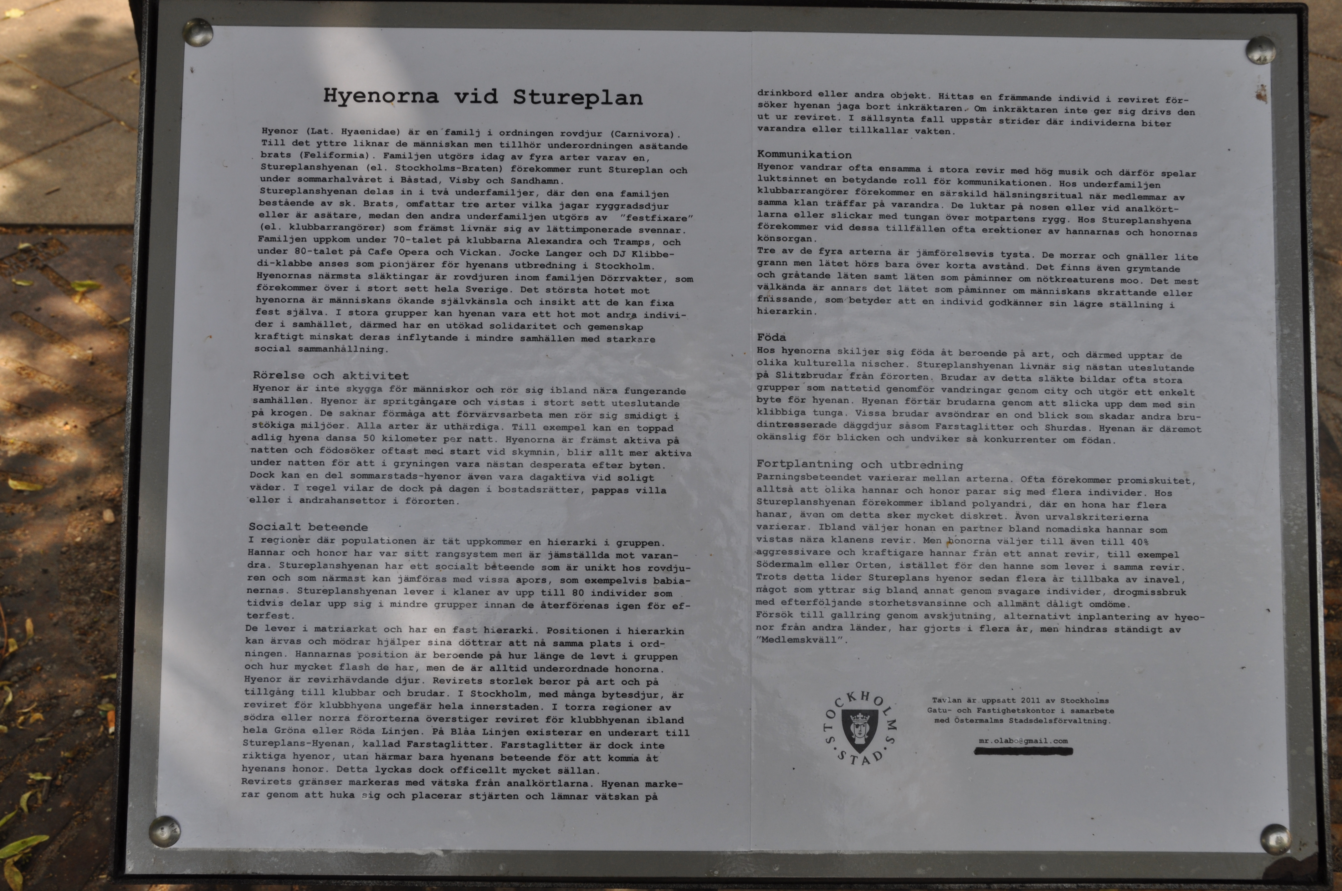 Hyenorna vid Stureplan. Gatukonst utplacerad vid Engelbrektsplan, Stockholm av olabo